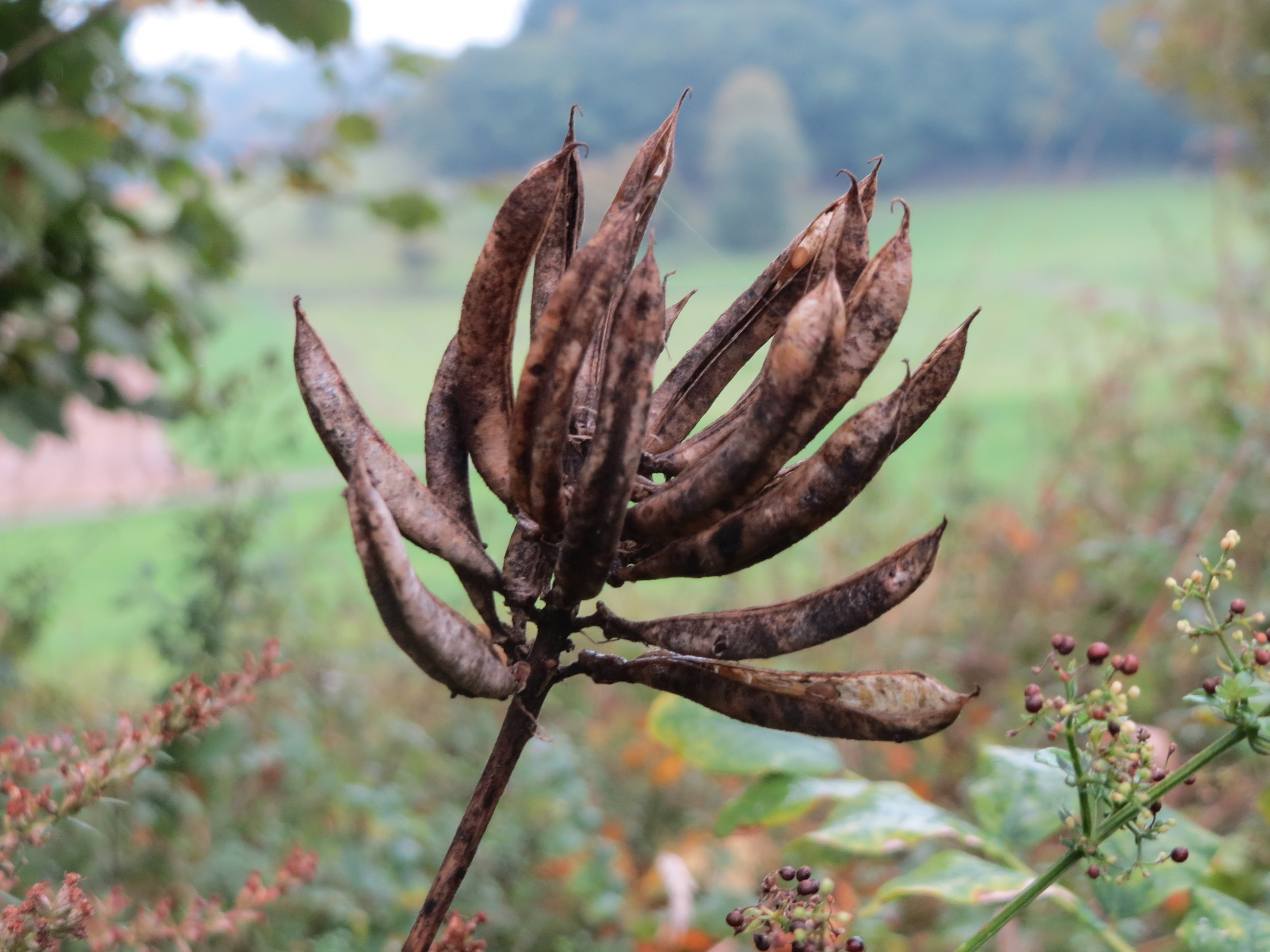 Bärenschote (Astragalus glycyphyllos) am Schalkenmehrener Maar